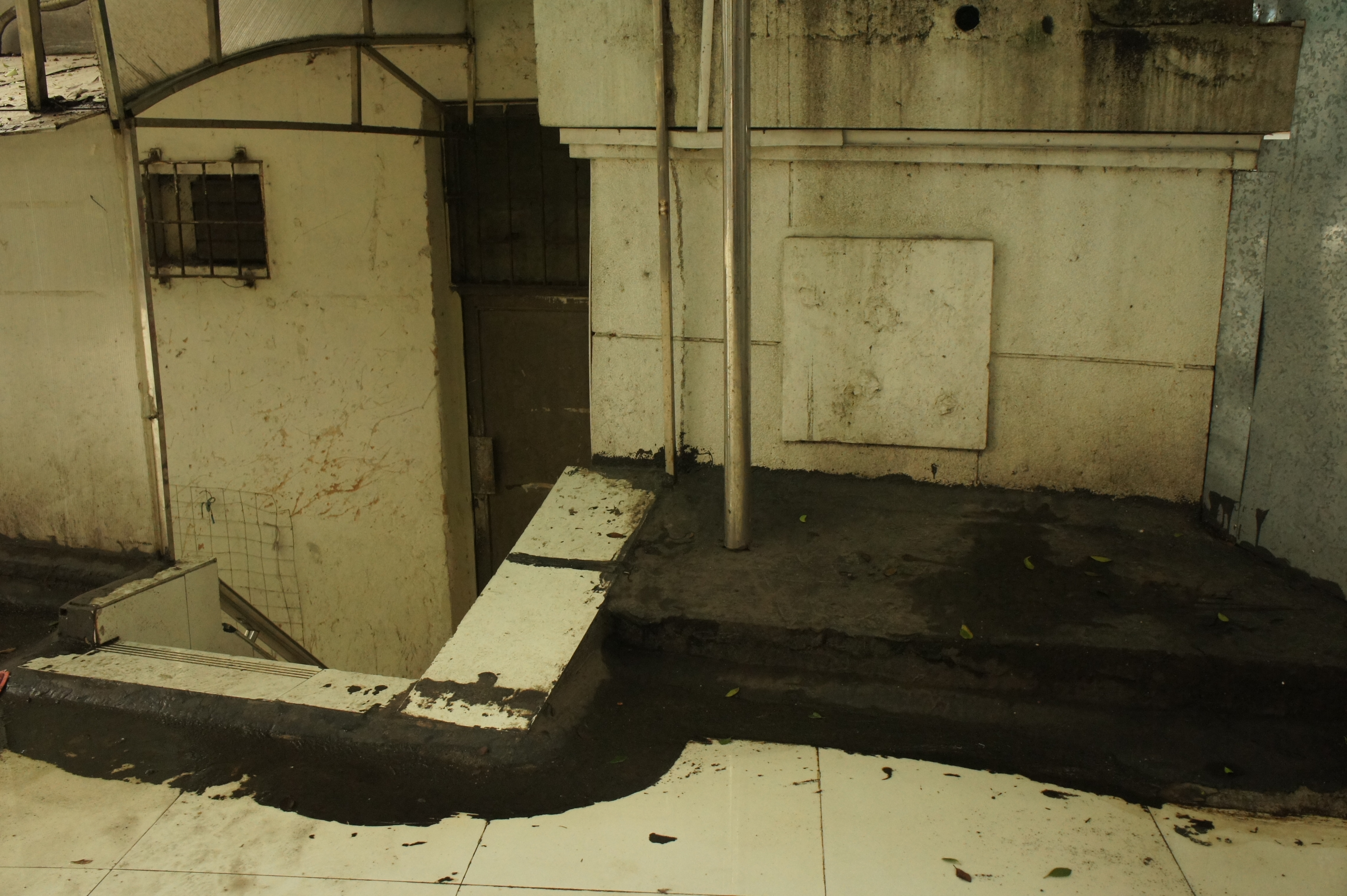 廣州市新一軍印緬陣亡將士公墓左門屋頂。